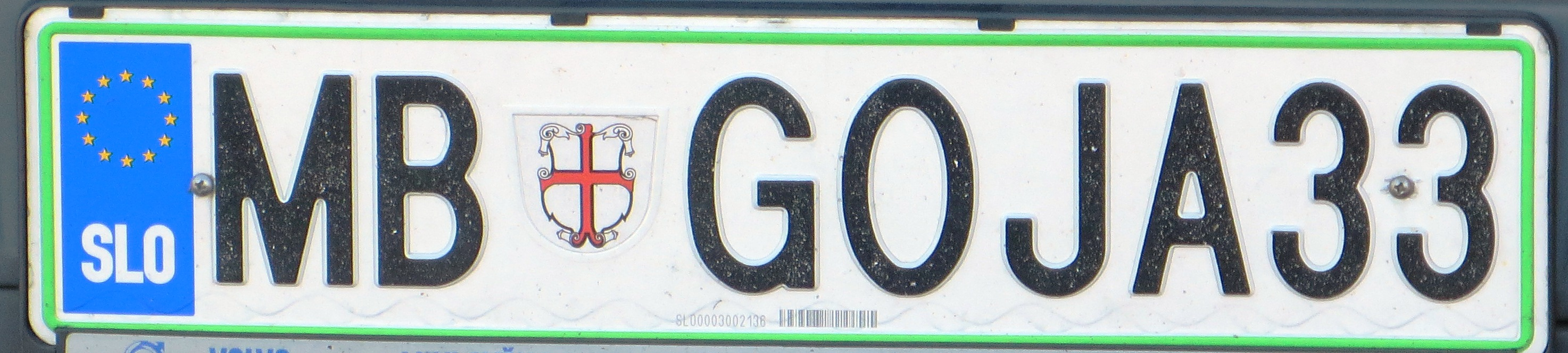 persoonlijke plaat Slovenië